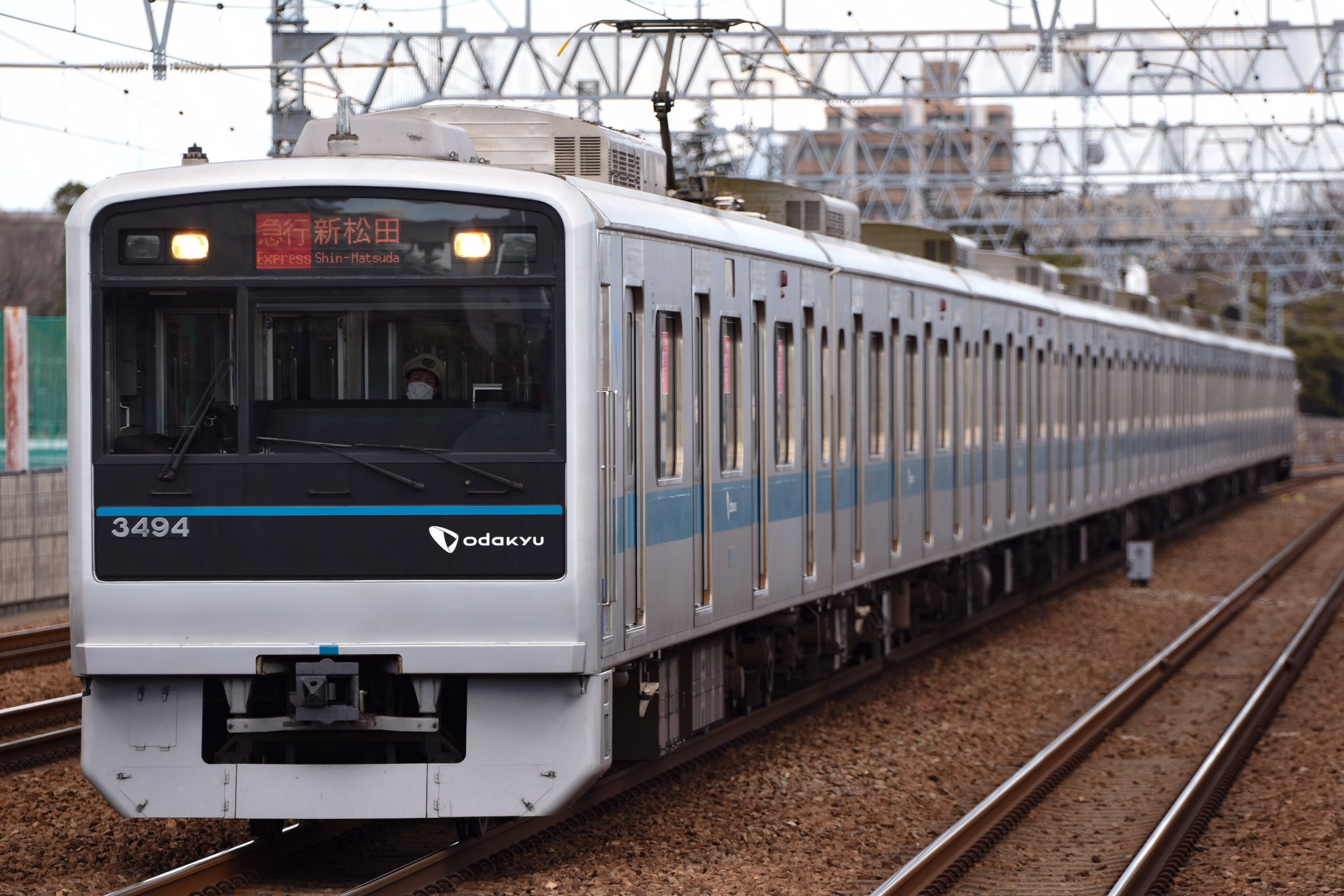 小田急3000形3094F 急行新松田 小田急小田原線狛江駅